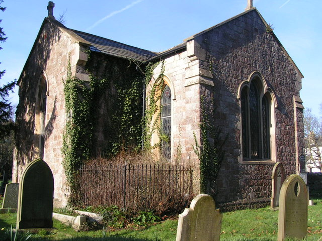 St John The Evangelist